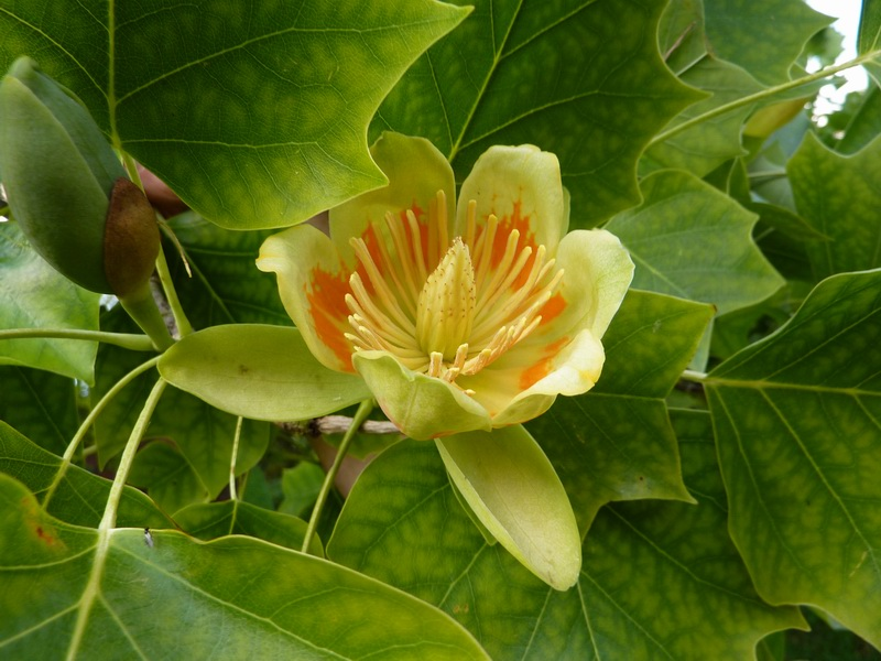 Tulip tree